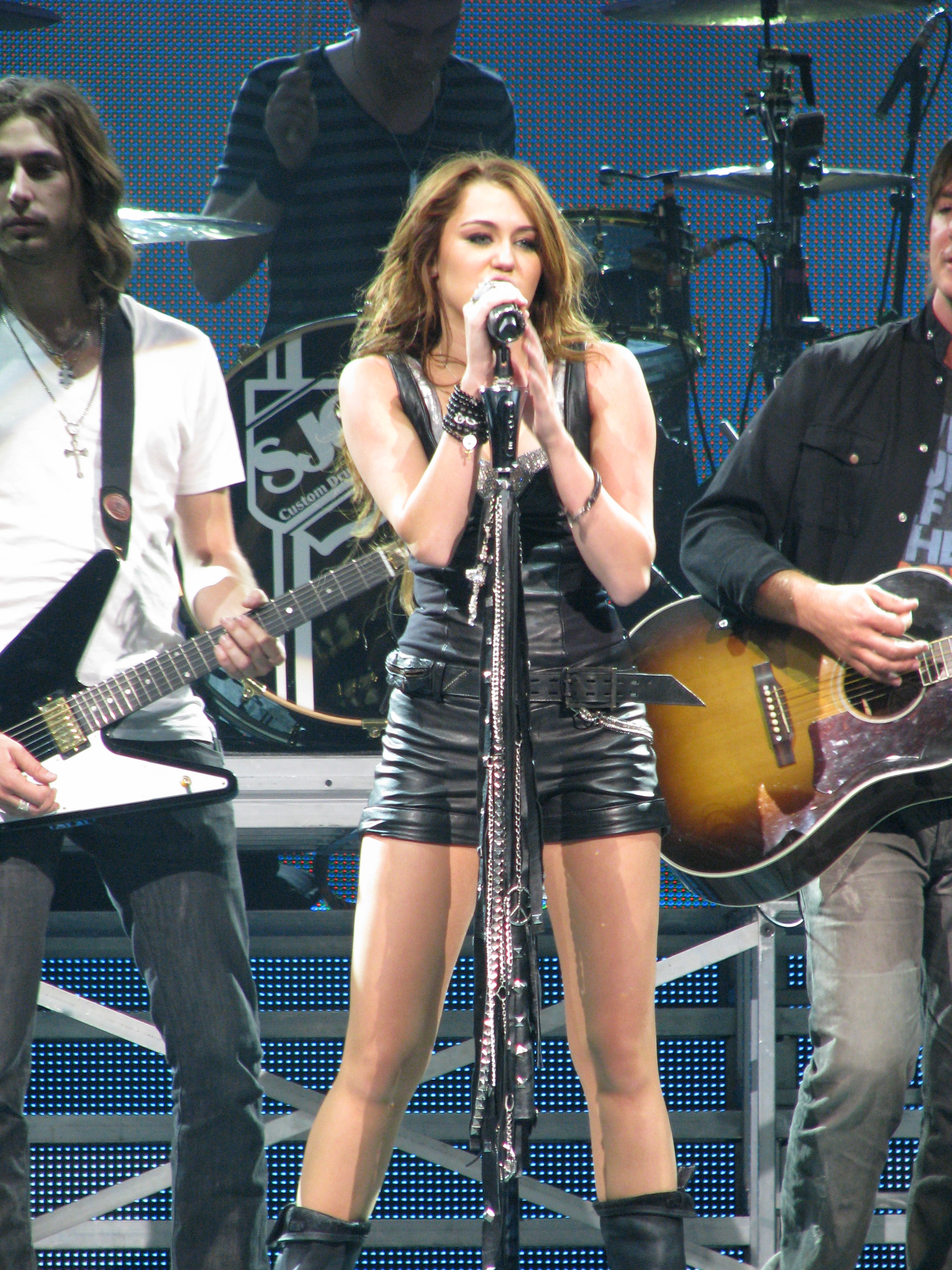 A teen singing.